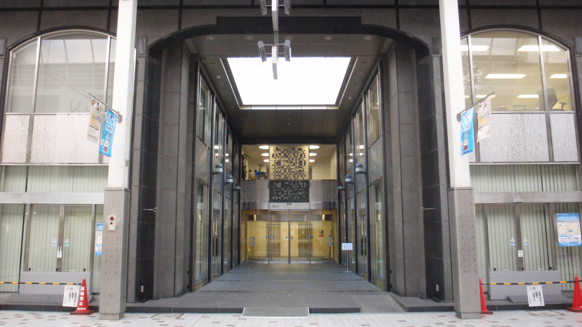 香川県高松市兵庫町にある日本生命兵庫町ビル。四国航空本社などが入居している。